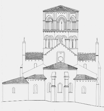 Plan du chevet de l'église romane d'Anzy-le-Duc réalisée en 1991 par le CEP en collaboration avec la faculté d'architecture de l'Université de Gdansk.